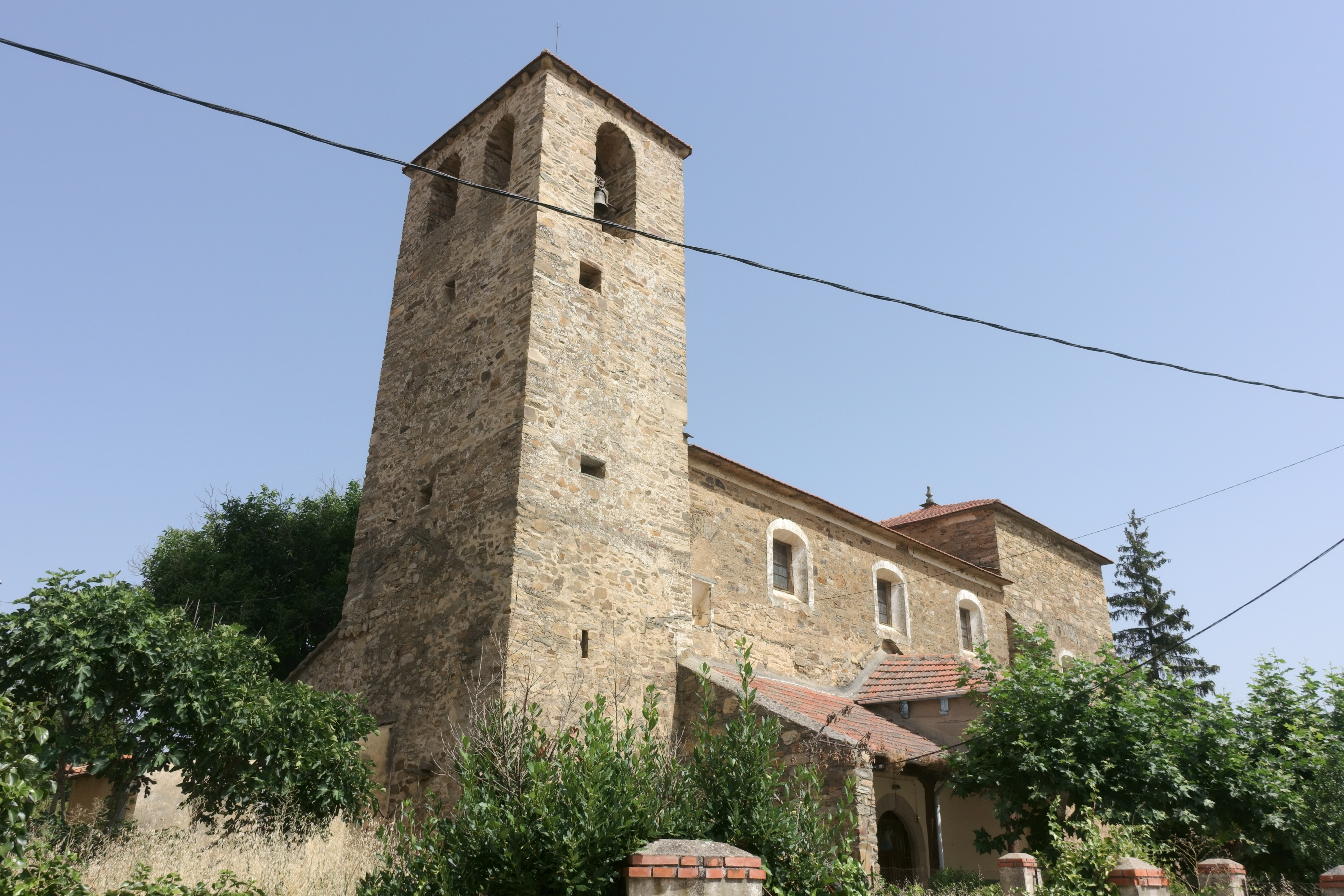 Iglesia de Nuestra Señora del Caño, en Riego de la Vega (León, España).